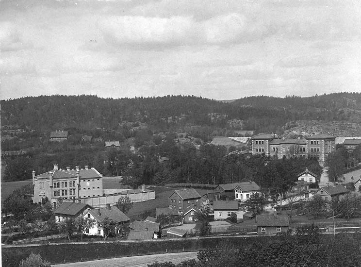 Uddevalla_kronohäkte_Uddevalla_lasarett_1890_